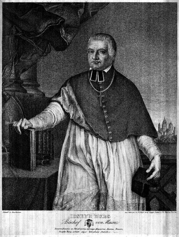 Joseph Vitus Burg (1766-1833)